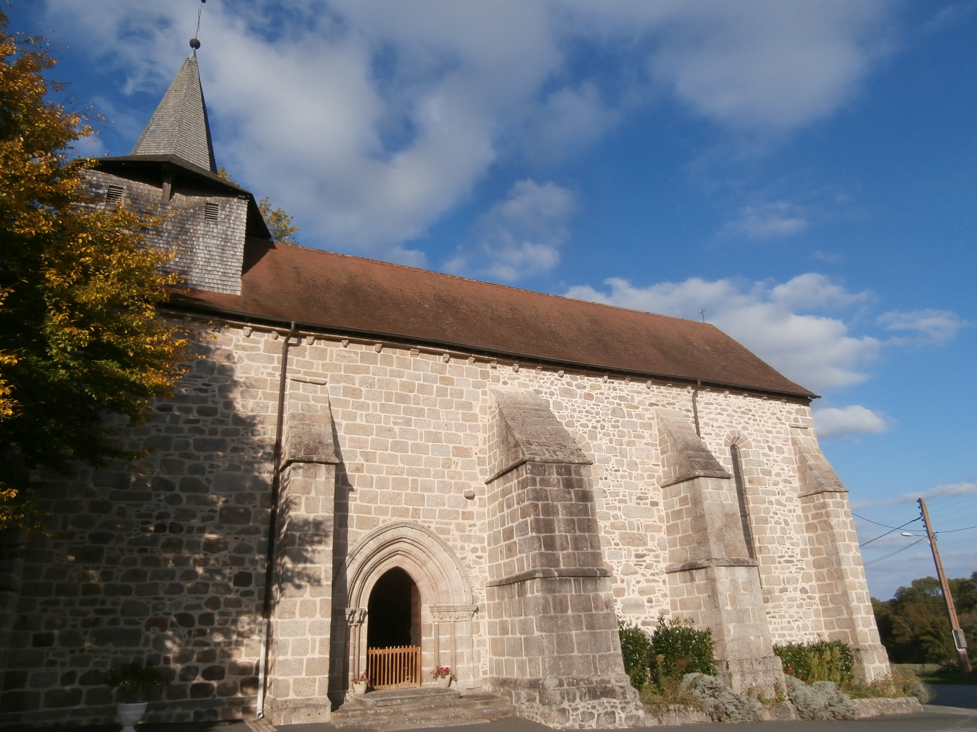 Église Saint-Sulpice de LAdapeyre, entièrement construite en granit à la fin du 13e siècle. Voûtée de trois voûtes d'arêtes et une semblable avec oculus. Retombées sur colonnes en profil d'ogive avec chapiteaux ornés de feuillages, hormis ceux du grand doubleau. A l'extérieur, corniche ornée de corbeaux à têtes.